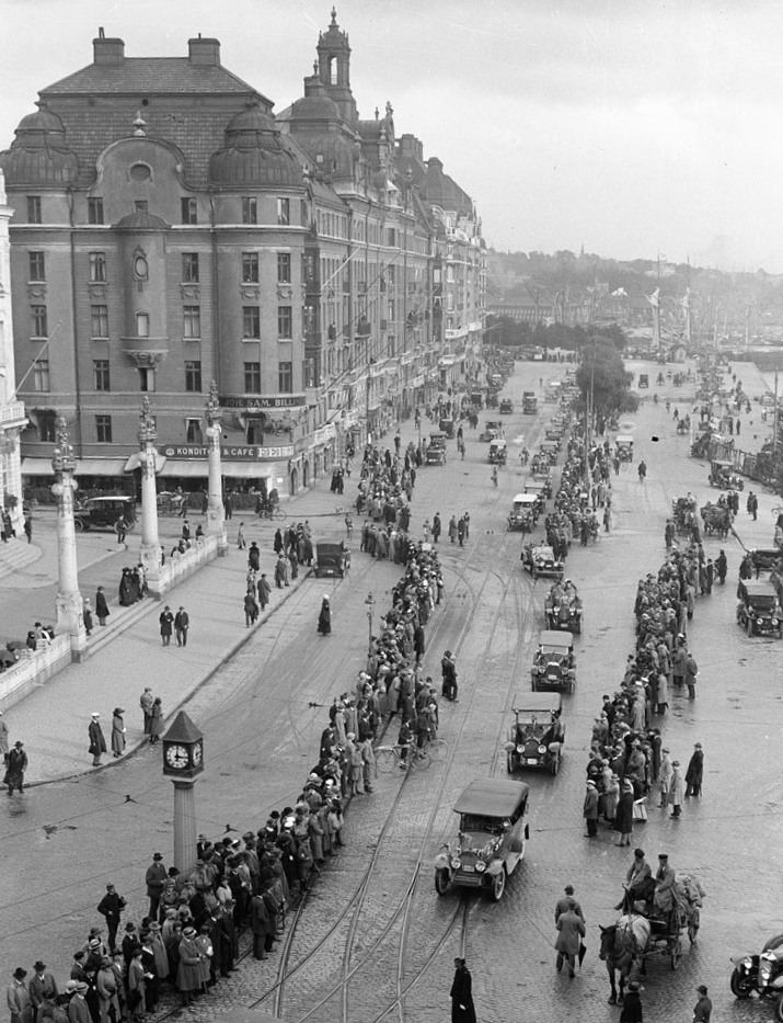 Bilar i kortege vid Nybroplan och längs Strandvägen Foto Nyckelord Plats: Kvarteret BODARNE. Nybroplan. Strandvägen. Östermalm. Tid: 1920 - 1930 Ämne: Allmänna utsikter. Folkliv. Bilar. Korteger. Referenser Upphov: Ransell, Karl. Tid: 1920 - 1930 Beteckning: Fotonummer KR 141